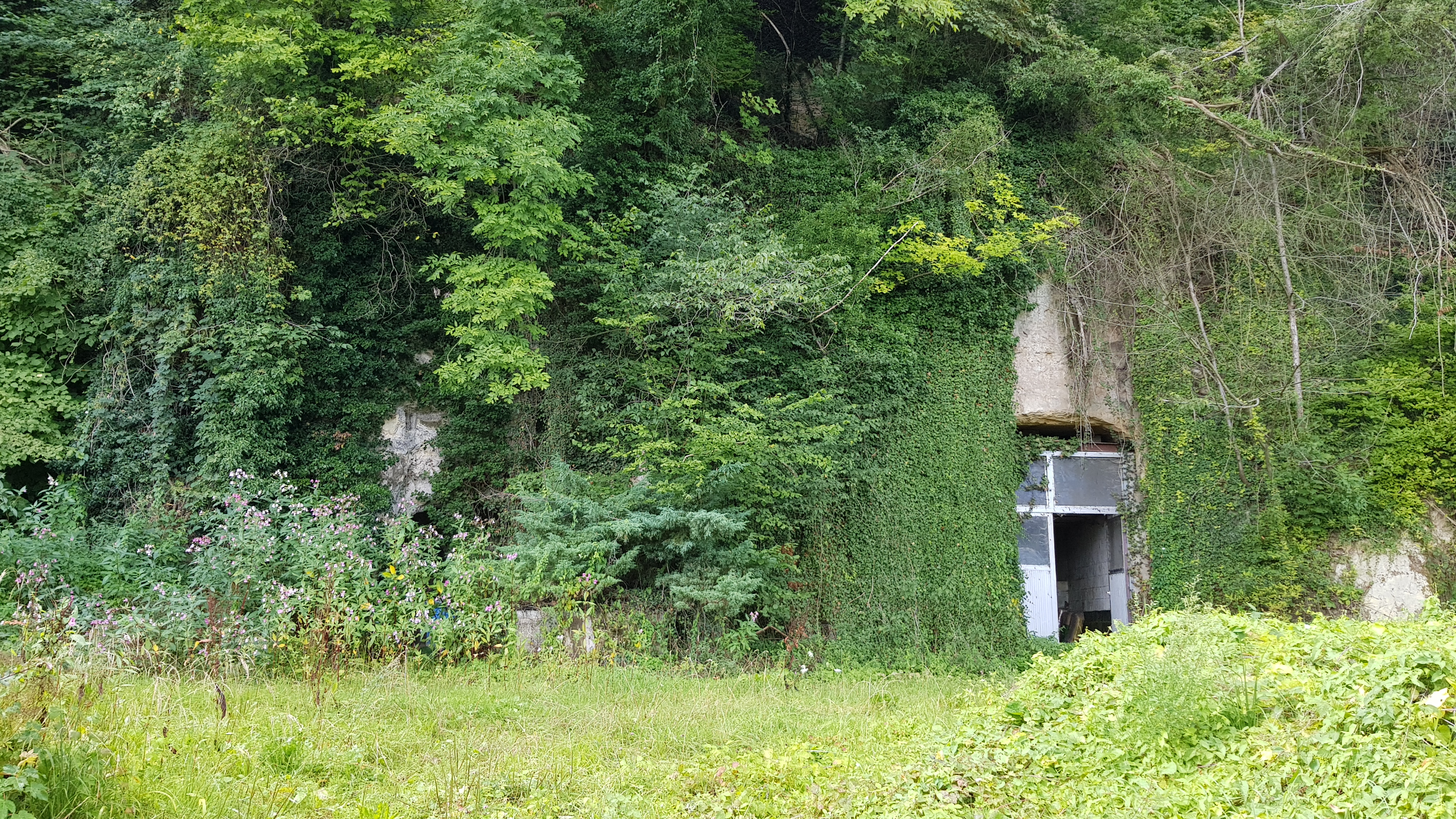 Ravensgroeve II + Onder de Ravengroeve, Geulhem, Nederland